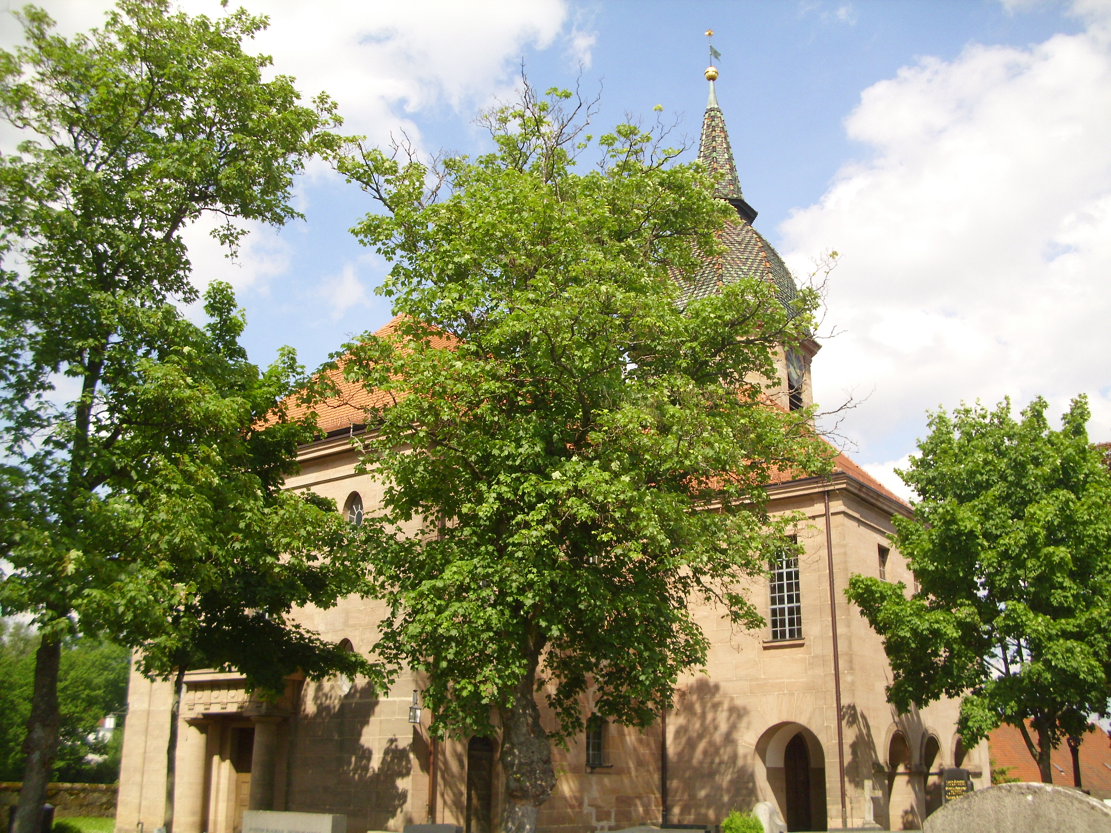 Die spätbarocke Georgskirche (1757–1758) liegt oberhalb des Steinbachs (Am Kirchenbuck) und vis-à-vis vom alten jüdischen Friedhof (Am Talbuck) westlich der Fränkischen Rezat.